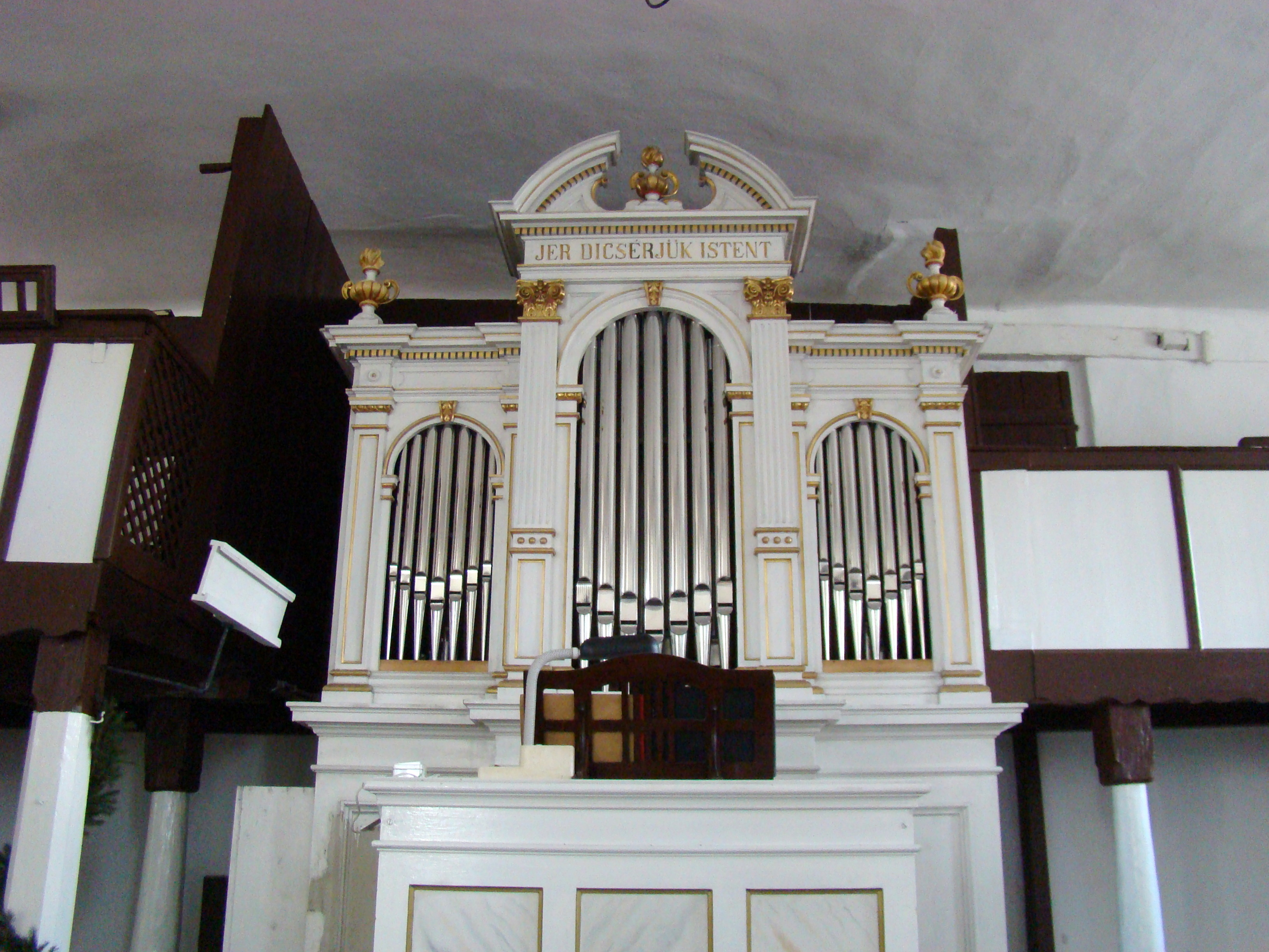 Biserica evanghelică, oraș Copșa Mică, str. Mediașului 100 01